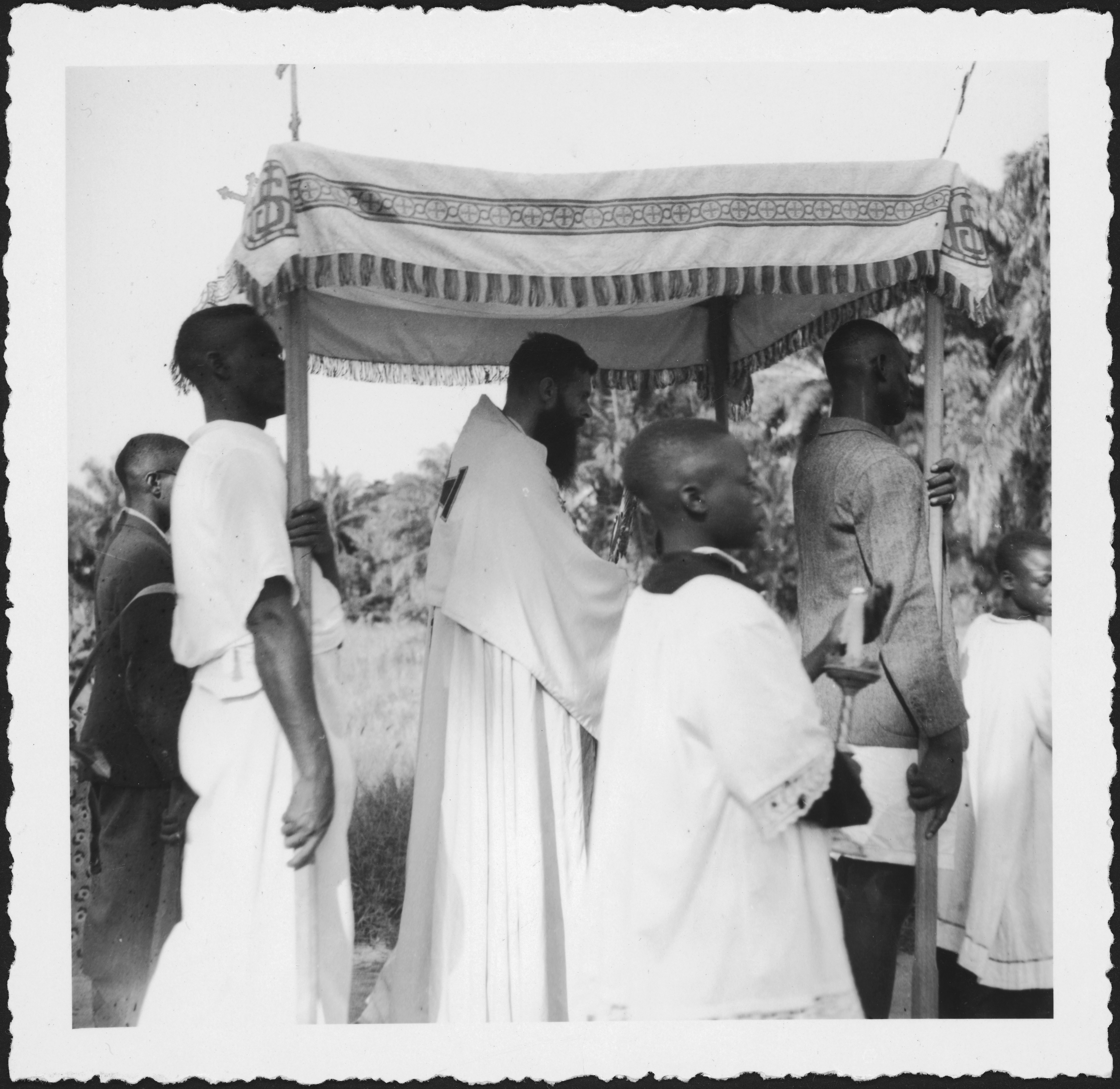 Belgisch-Kongo, Buta: Alltagsszene; Katholischer Priester unter Baldachin getragen von mehreren farbigen Männern